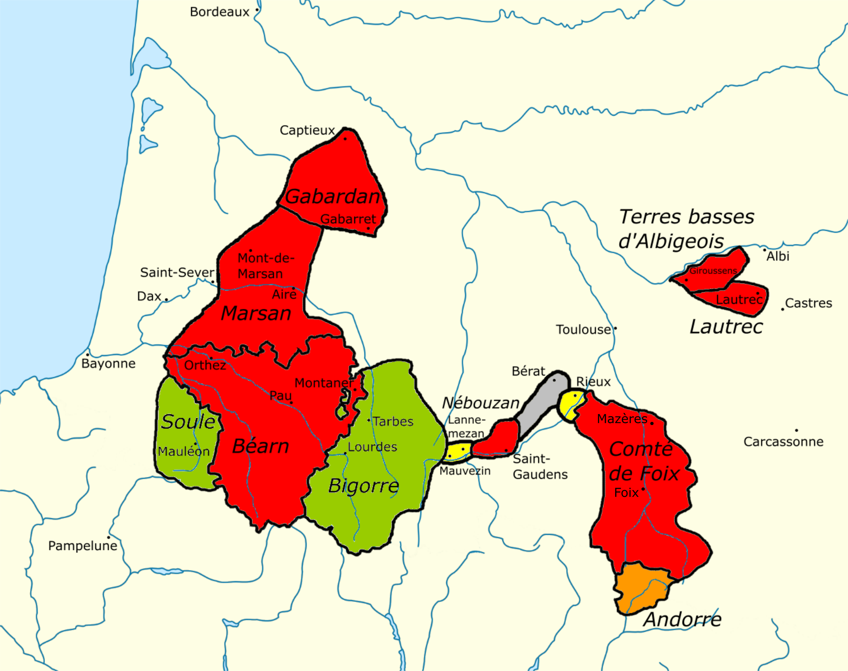 Les territoires de Gaston III de Foix-Béarn, dit Fébus, à sa mort en 1391. En rouge les territoires dont il dispose seul lors du début de son règne, en orange Andorre dont il est co-seigneur, en jaune les territoires conquis durant sa vie, en vert les territoires dont il assure la protection militaire, en gris la zone d'influence des seigneurs faisant partie de l'obédience de Fébus.